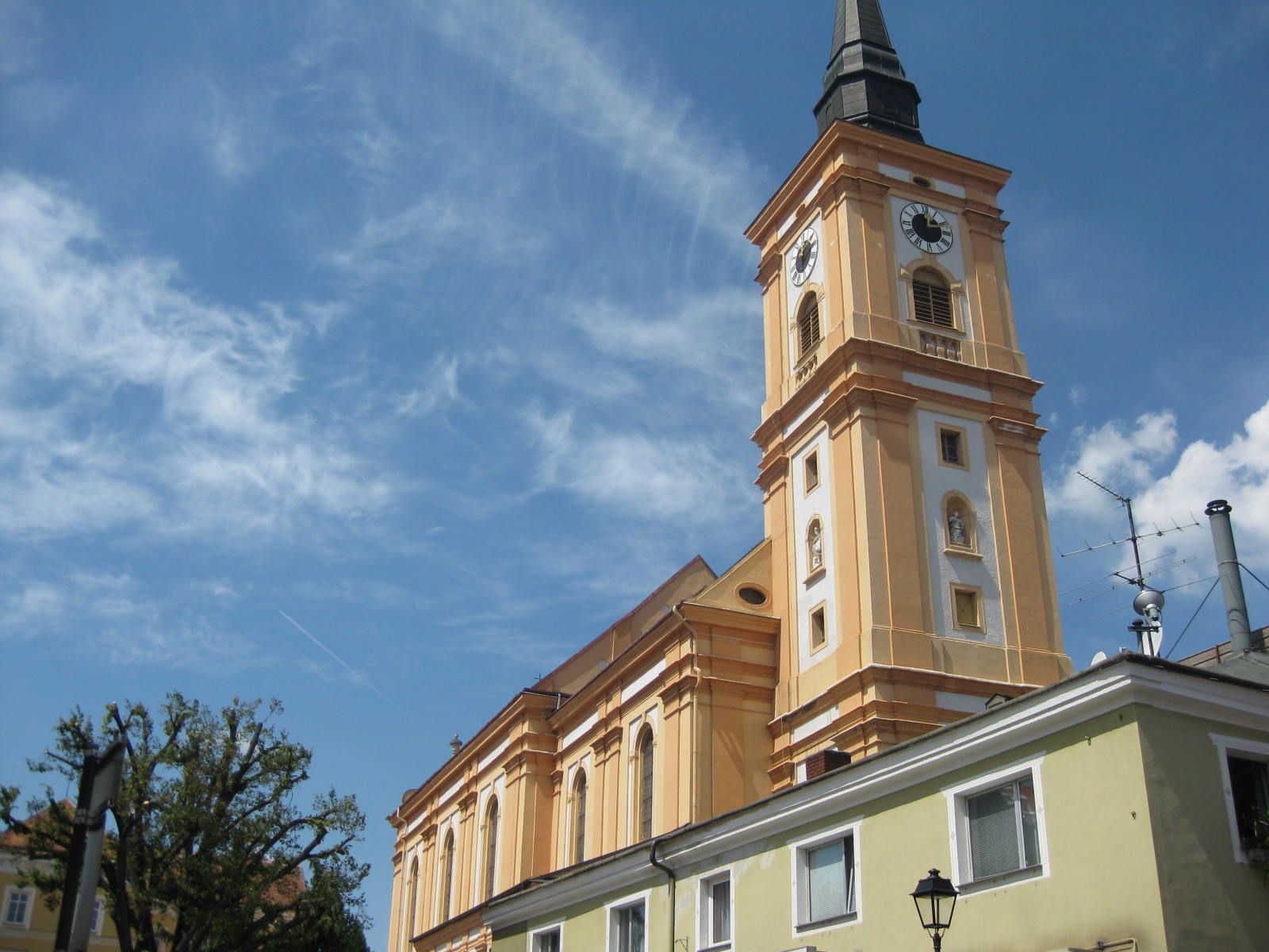 Kath. Pfarrkirche Mariae Himmelfahrt